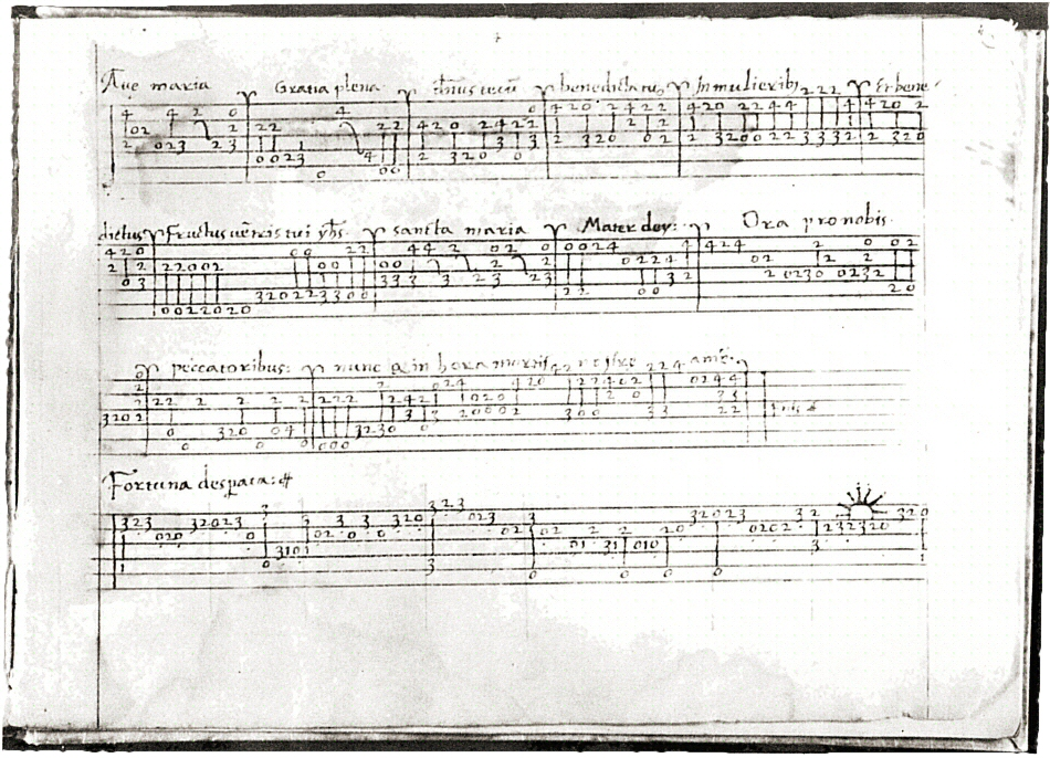 Tablature manuscrite pour luth, une des plus anciennes connues. Bartolomeo Tromboncino vers 1521.